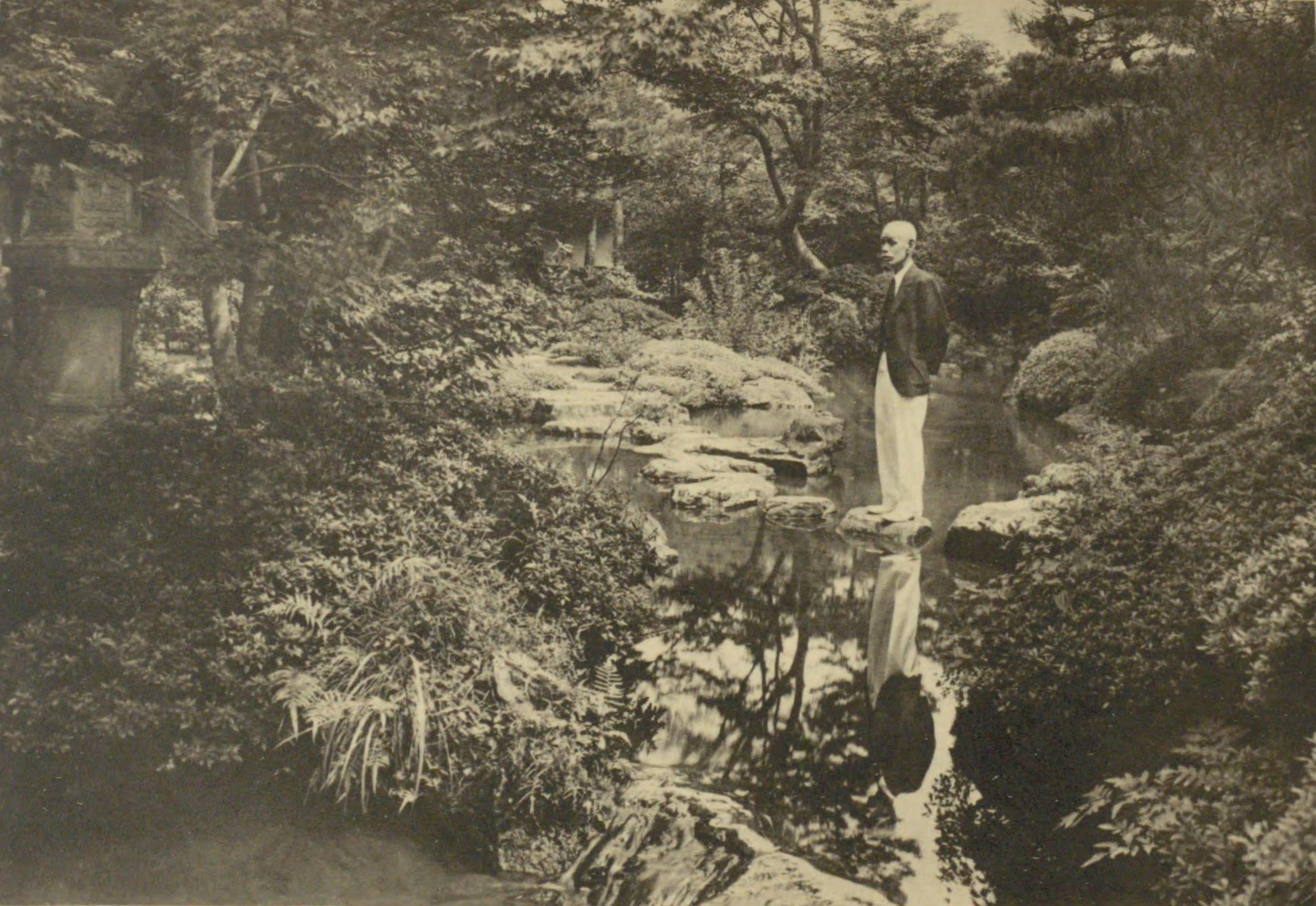 洛東南禅寺の本邸庭園に於ける山中定次郎